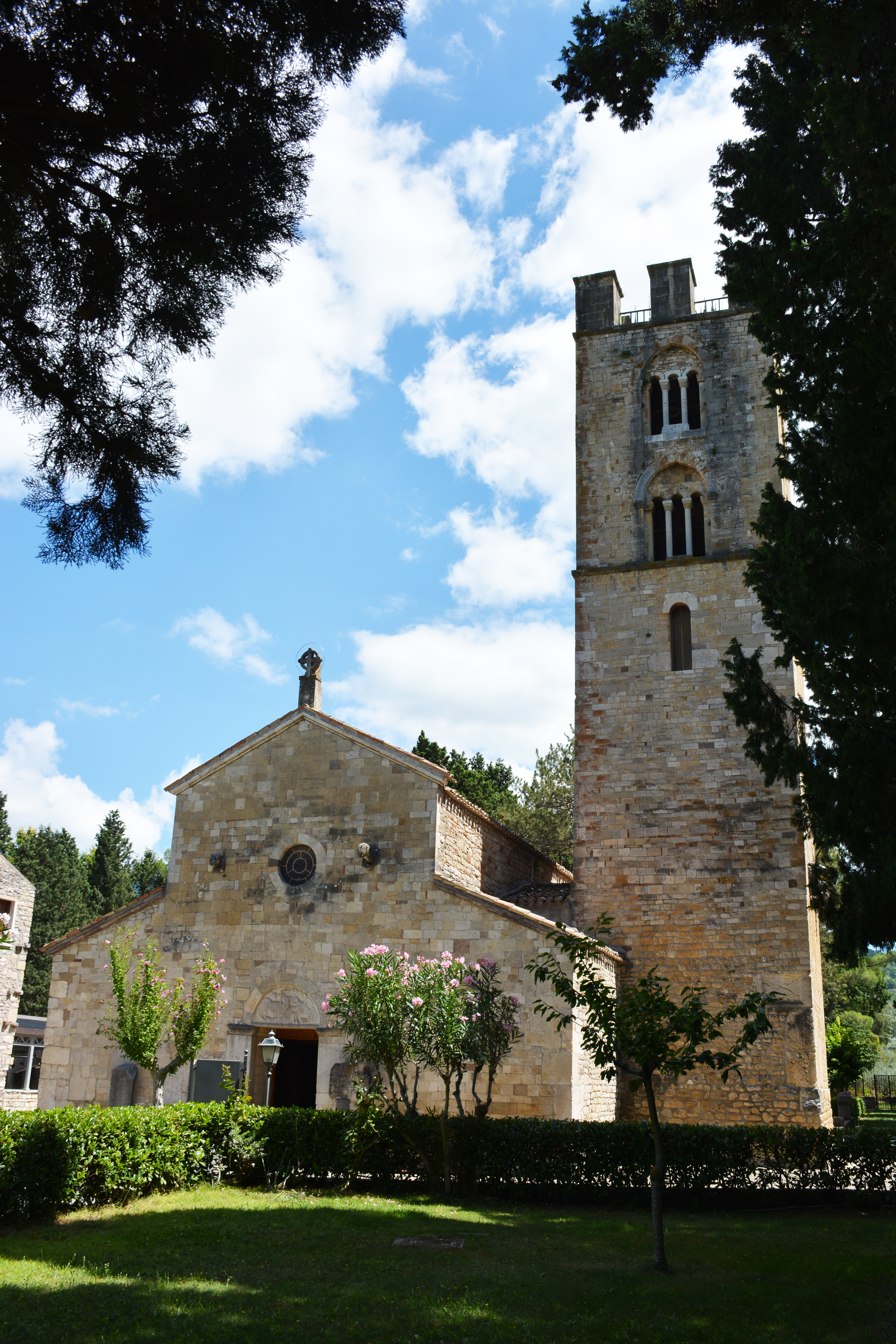 Santuario di Santa Maria del Canneto This is a photo of a monument which is part of cultural heritage of Italy.